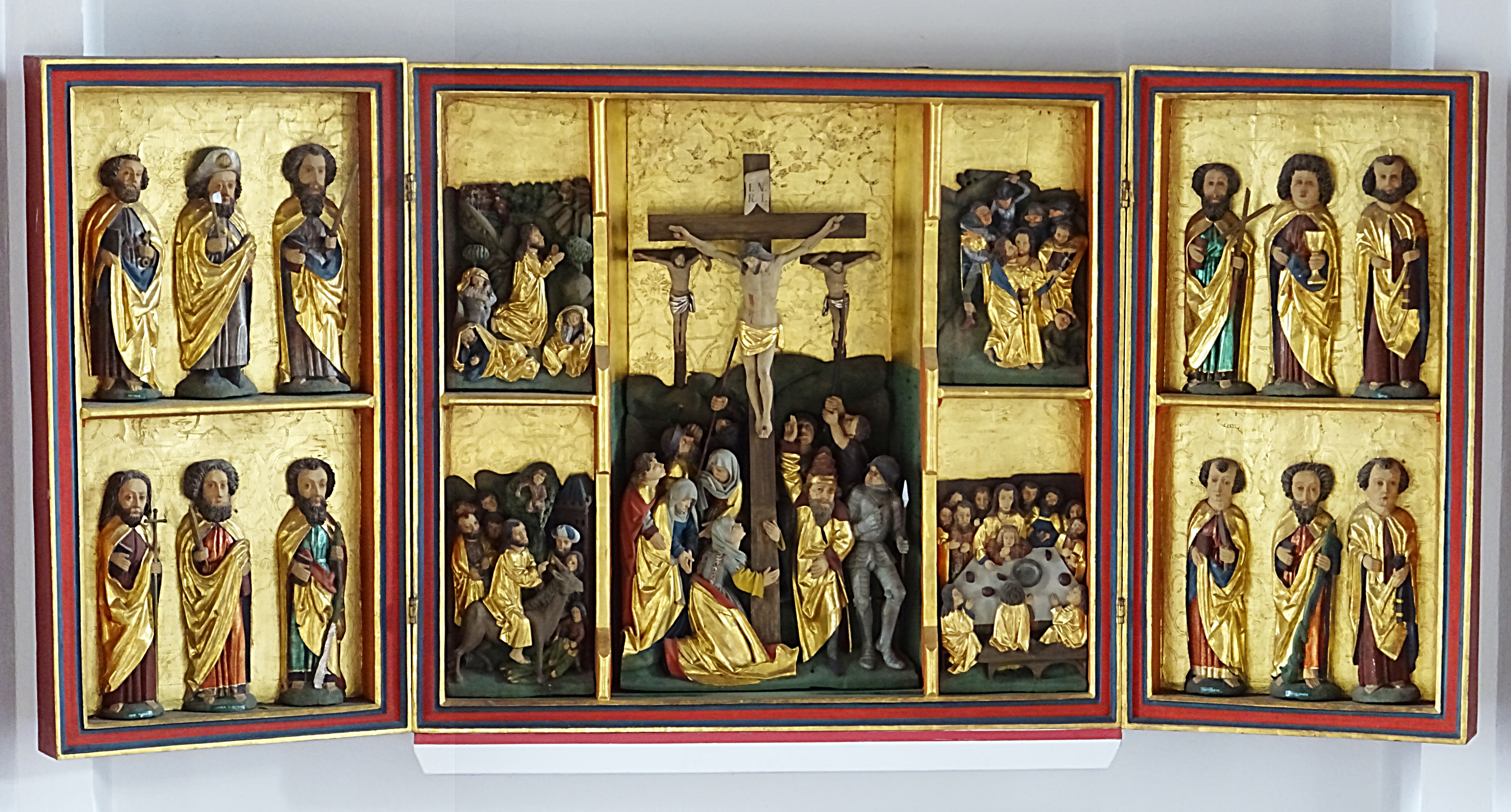 Passionsaltar in der Dorfkirche St. Michael (Schönhagen). In den zweigeschossigen Seitenflügeln stehen vor vergoldetem, mit Ornamenten geziertem Hintergrund, die zwölf Apostel. Der Mittelschrein zeigt die Darstellung der Kreuzigung.